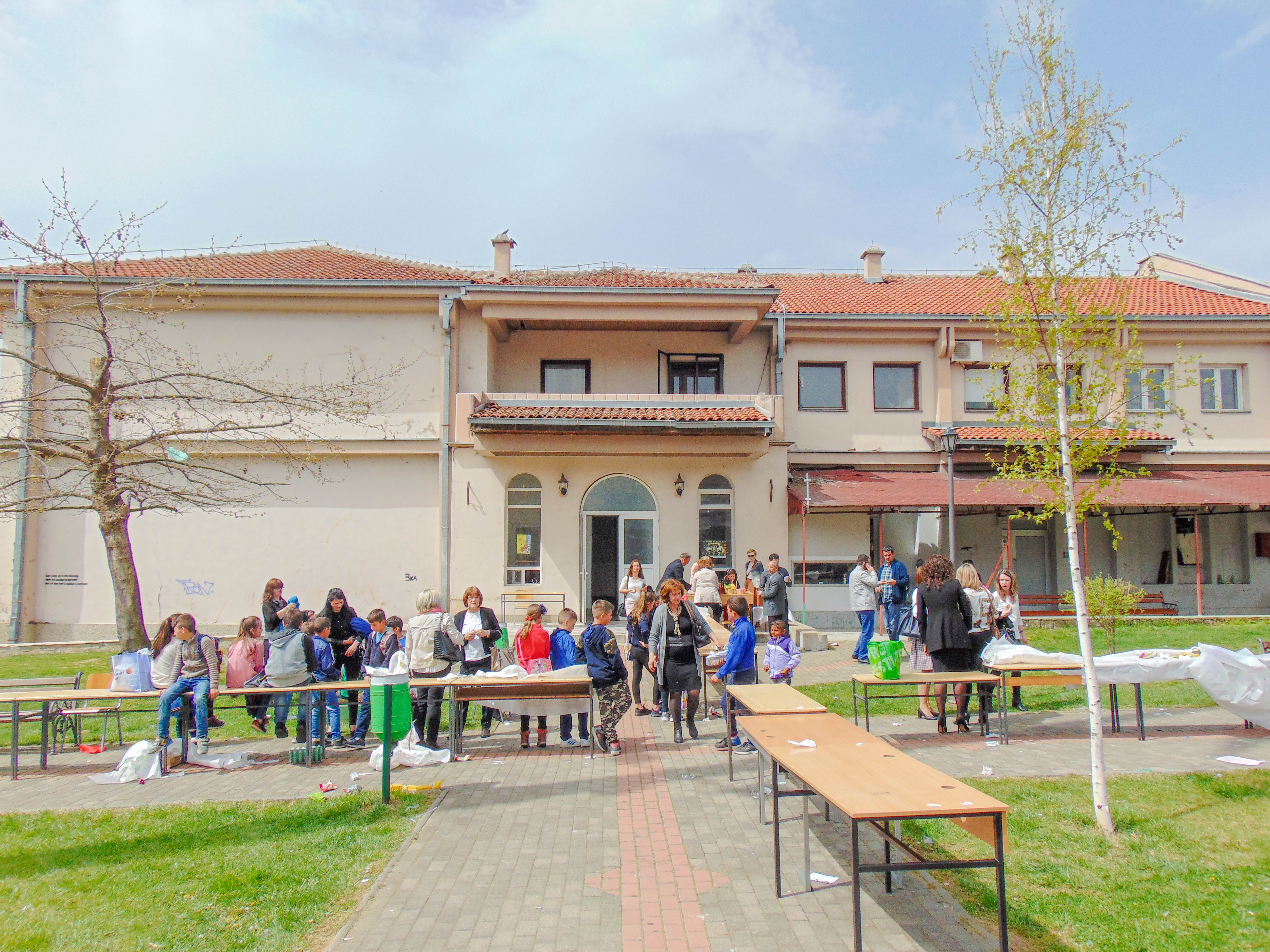 Дом на култура - Ново Село